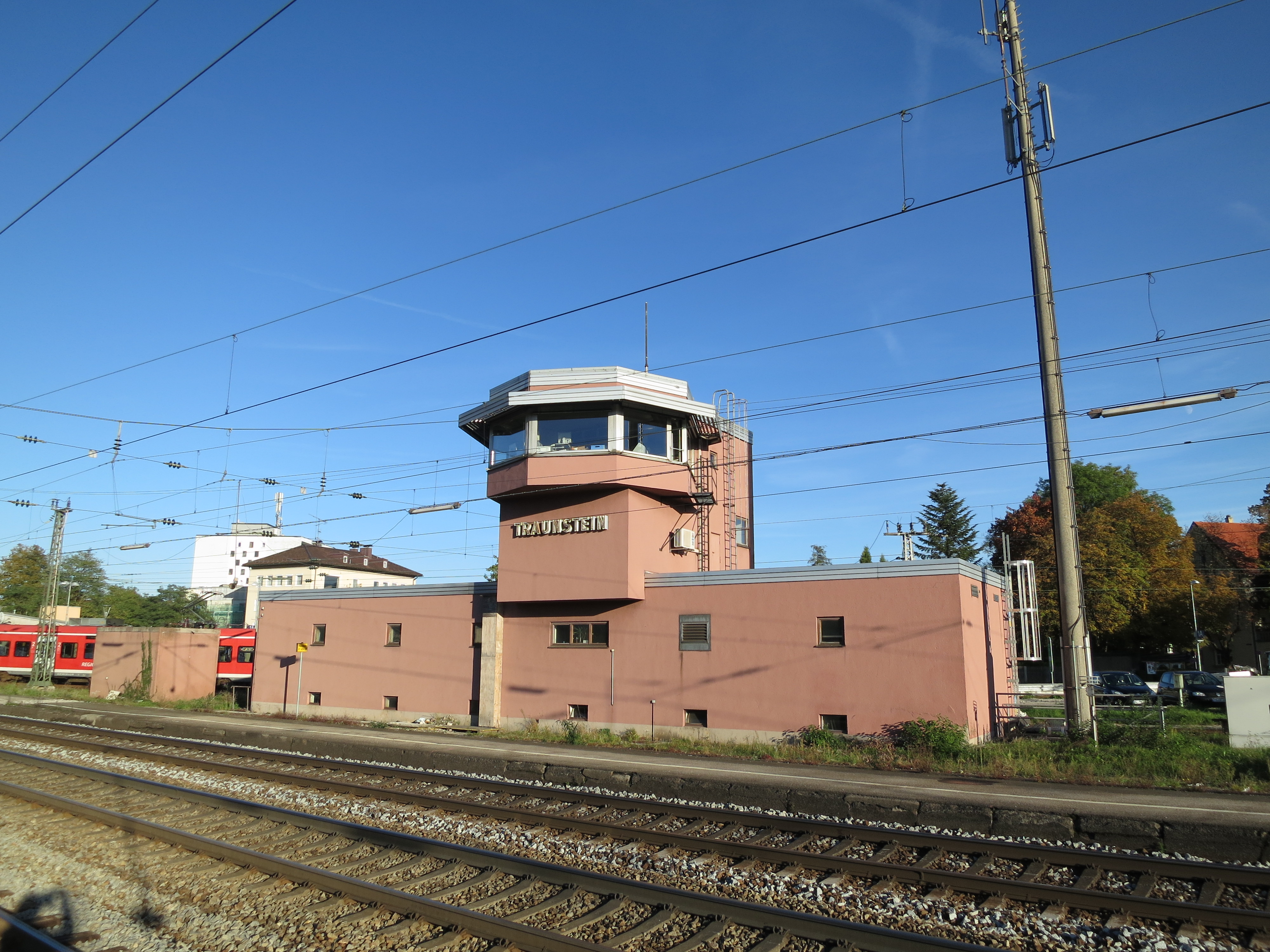 Spurplandrucktastenstellwerk des Bahnhofs Traunstein